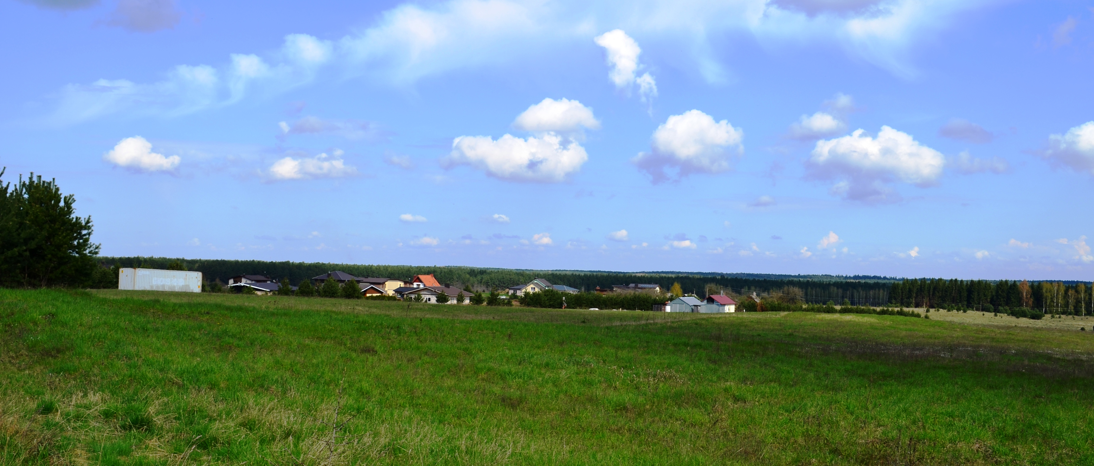 Paliuliškės, Vilniaus raj.